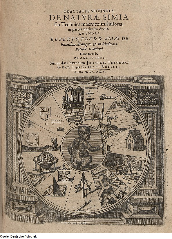 Original image description from the Deutsche FotothekGeometrie & Mathematik & Astrologie & Optik & Malerei & Architektur & Musik & Affe & Allegorie